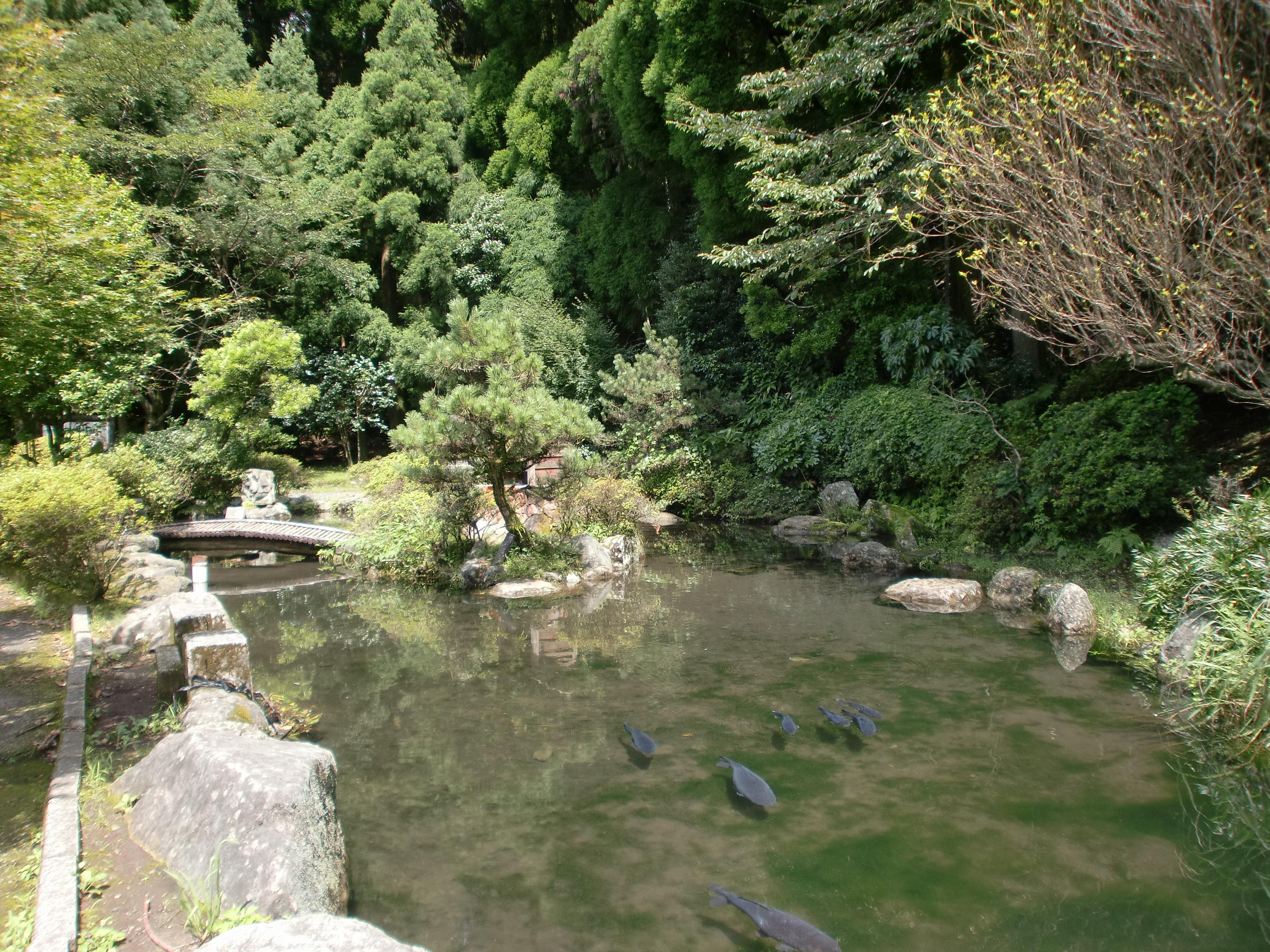 甲突川の源流となる甲突池の写真